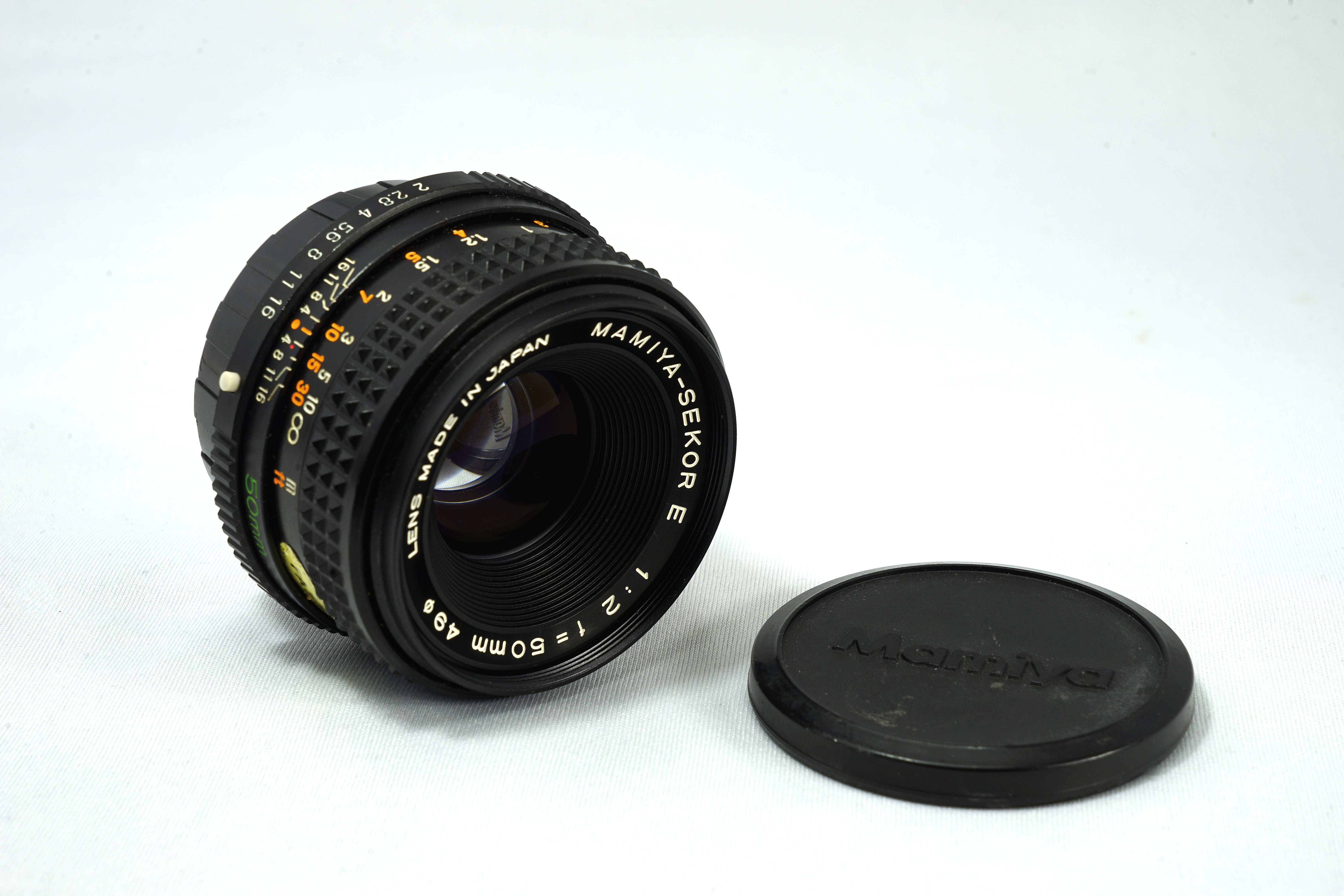 Mamiya-Sekor E f/2 50 mm